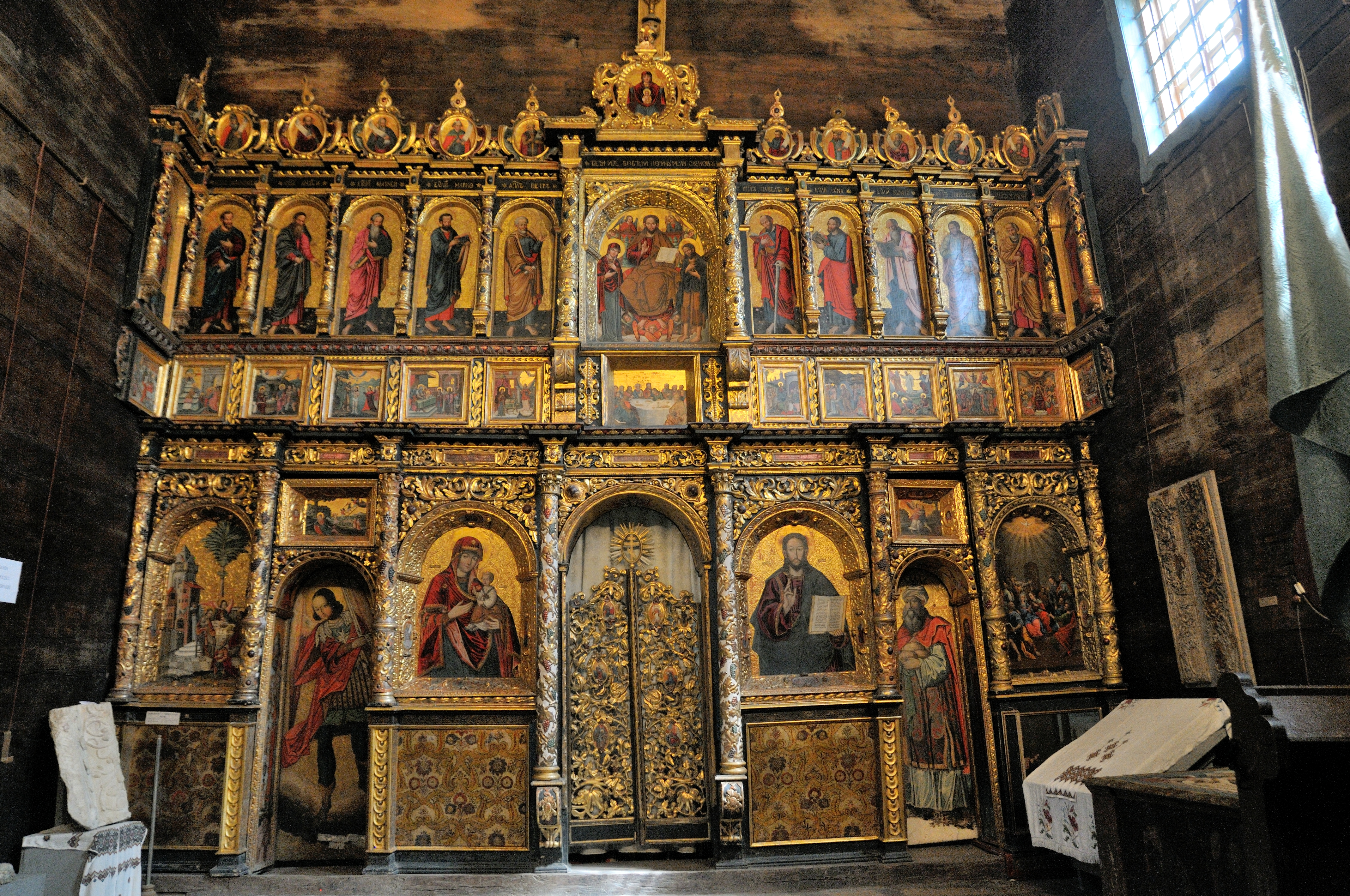 Святодухівська церква (дер.), Рогатин, вул. Роксолани, 10